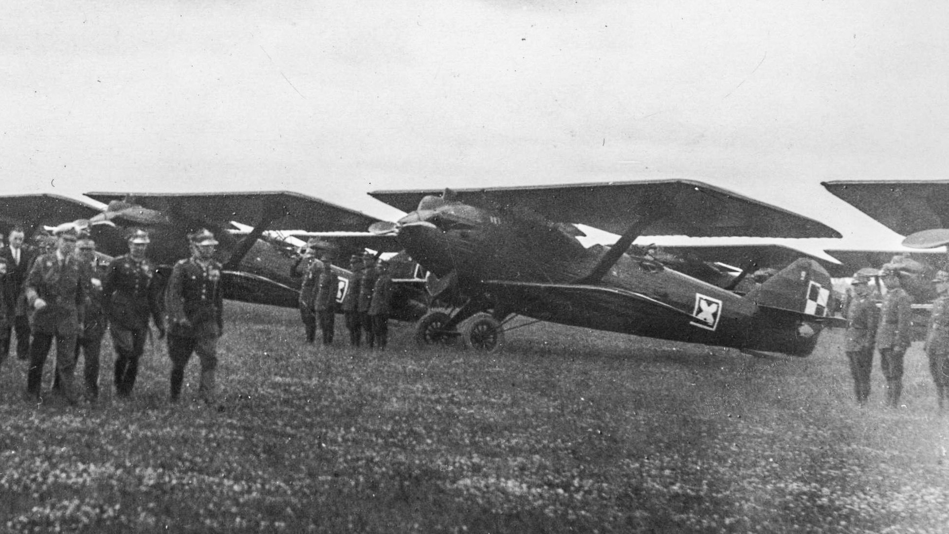 Wizyta brata króla Rumunii księcia Mikołaja w Polsce 27 czerwca 1933. Książę Mikołaj w asyście wojskowych dokonuje przeglądu 1 Pułku Lotniczego na lotnisku wojskowym na Okęciu. Widoczne samoloty Bréguet 19 B2. Koncern Ilustrowany Kurier Codzienny - Archiwum Ilustracji. Sygnatura: 1-D-1385-12